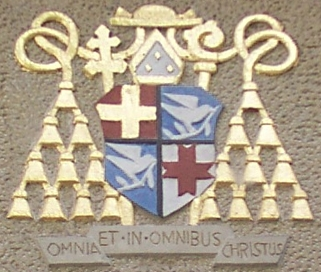 Wappen des Paderborner Erzbischofs Caspar Klein, aufgenommen an der katholischen Pfarrkirche Sankt Heinrich und Kunigunde in Schloß Neuhaus